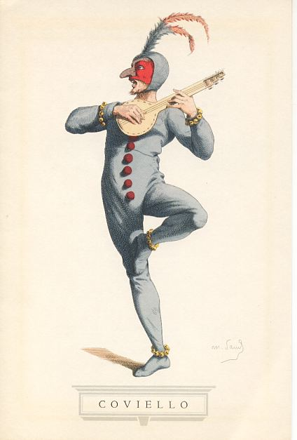 Coviello, eine Figur der Commedia dell'arte, Zeichnung von Maurice Sand ((1823-1889).